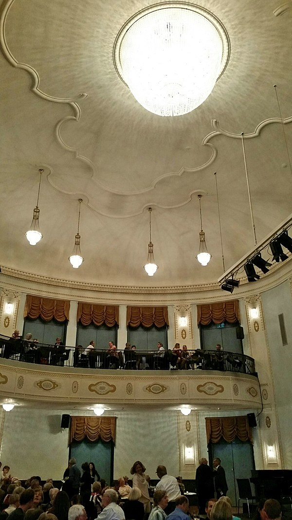 Theater Casino Zug, alter Saal